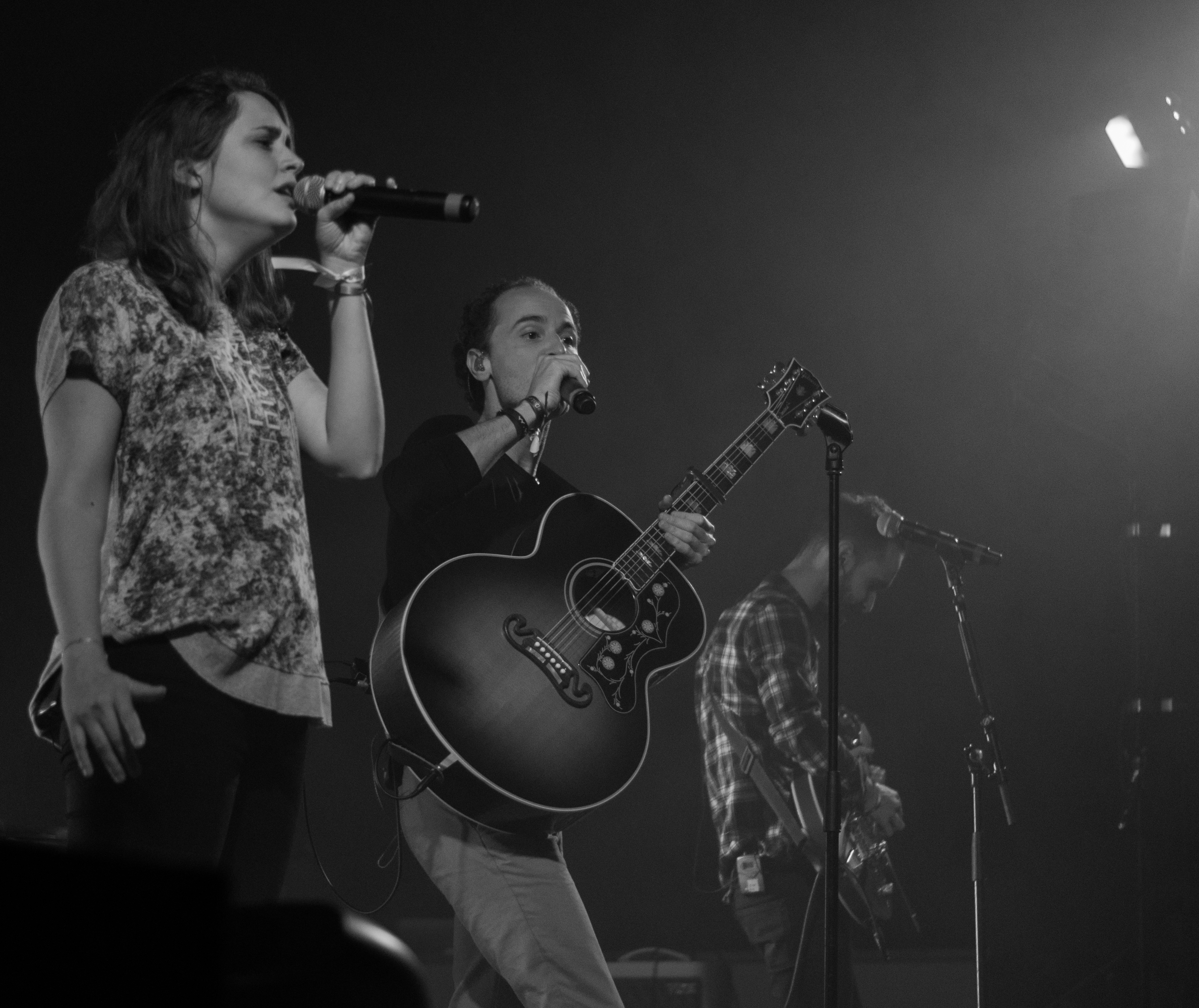 Concert de Glorious, le 27 septembre 2014, dans l'église St Urbain, à Strasbourg